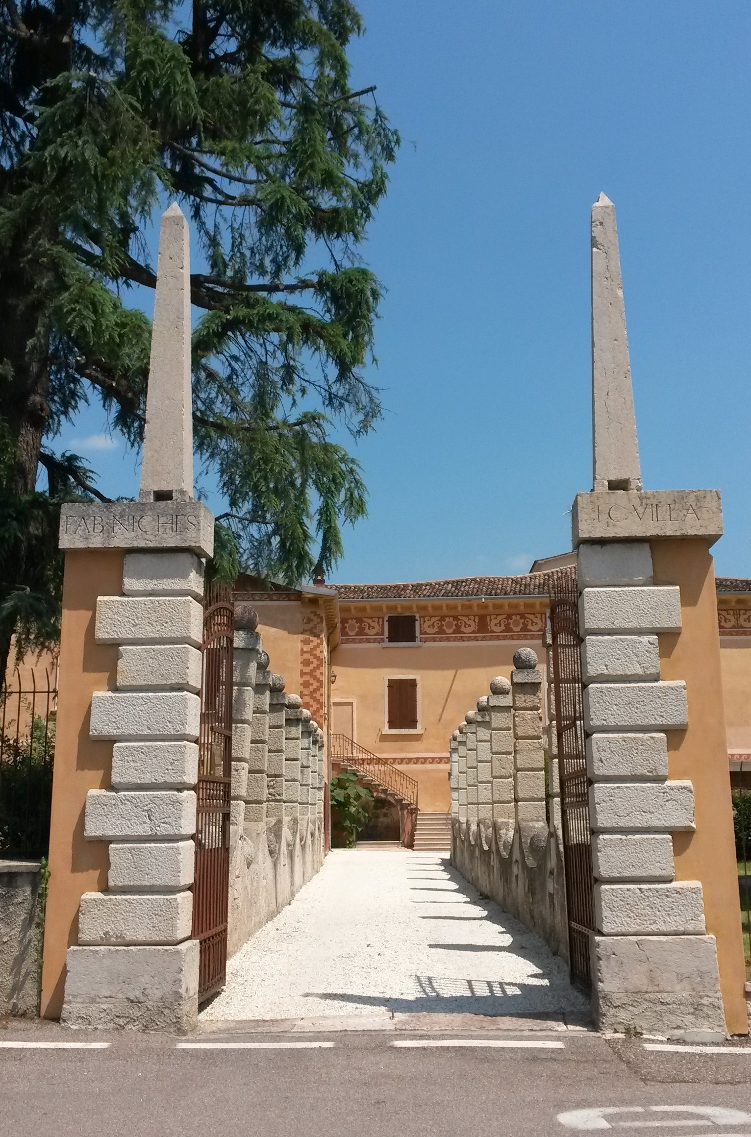 Ingresso cinquecentesco sormontato da obelischi. Sopra i pilastri è l'iscrizione in caratteri latini: FAB[II] NICHES[OLAE] / I[VRE] C[ONSVLTI] VILLA (Villa del giureconsulto Fabio Nichesola). Fabio Nichesola fece edificare la villa intorno al 1580-1590.